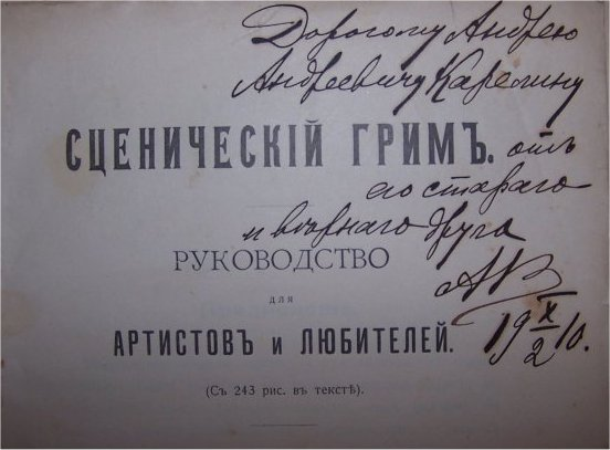 Дарственная А.А. Карелину от А.К. Воскресенского (автора)